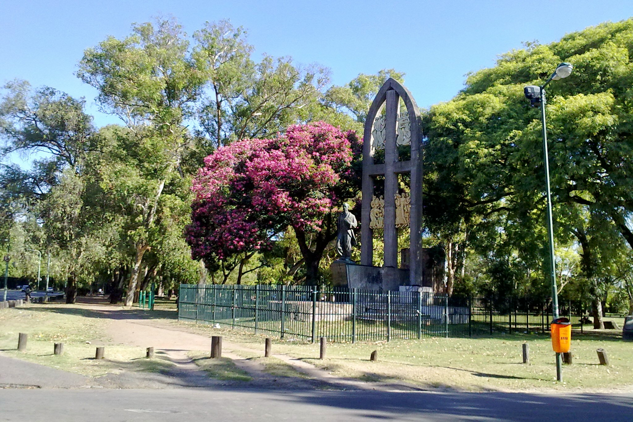 Monumento a William C. Morris, en Parque Tres de Febrero (Palermo).